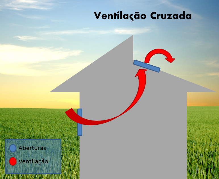 ventilation ventilazione